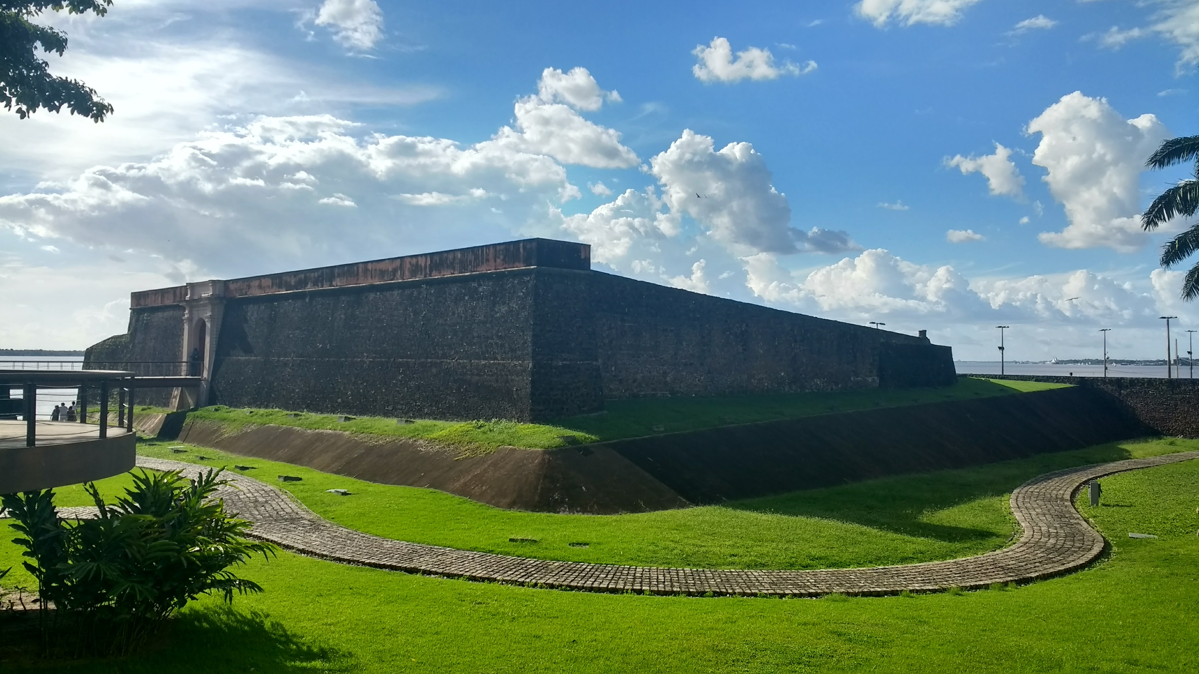 Vista exterior del Fuerte del Pesebre en Belém (Par)